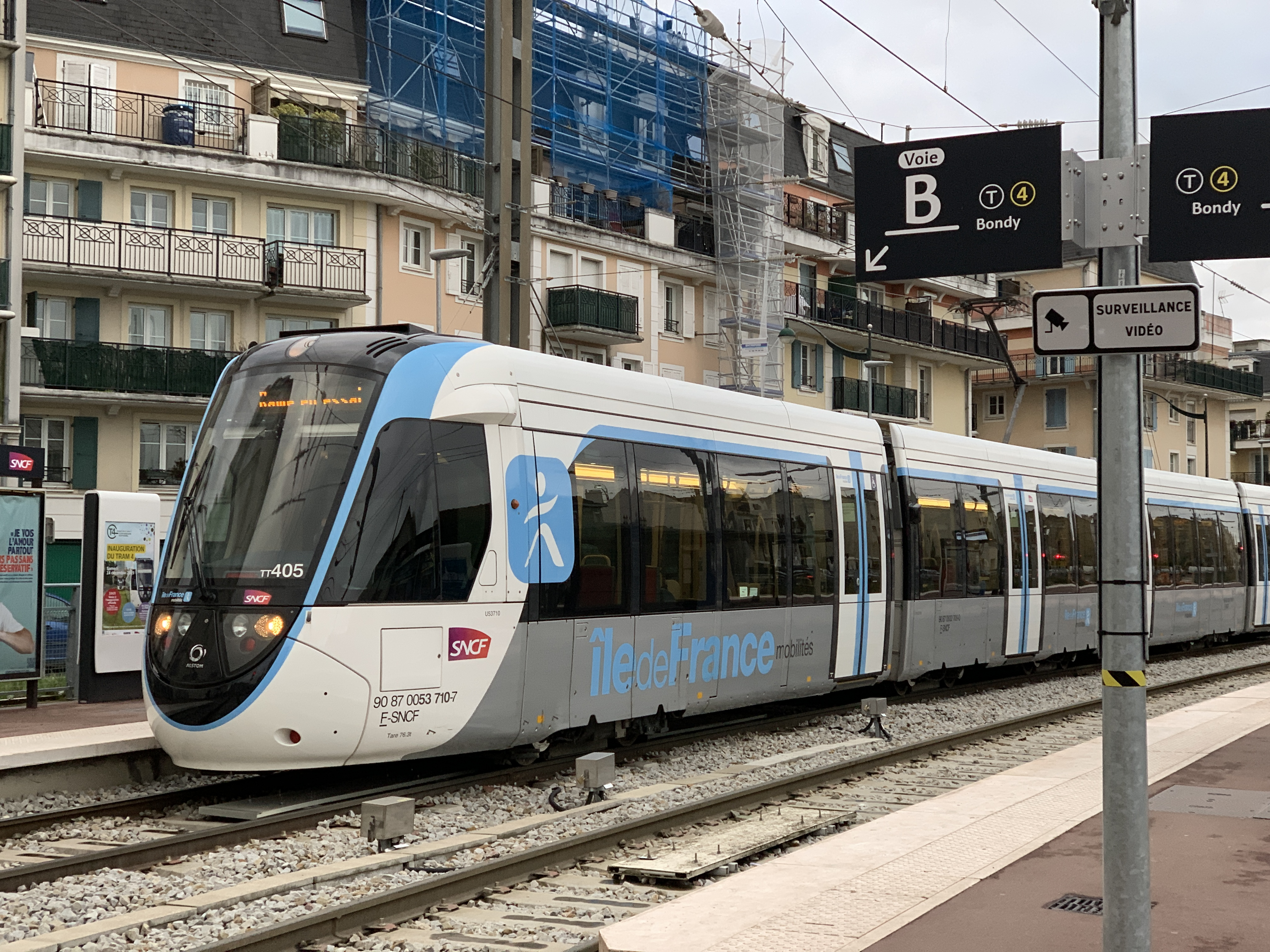 Station de tramway Gargan de la ligne 4 du tramway d'Île-de-France, Les Pavillons-sous-Bois.